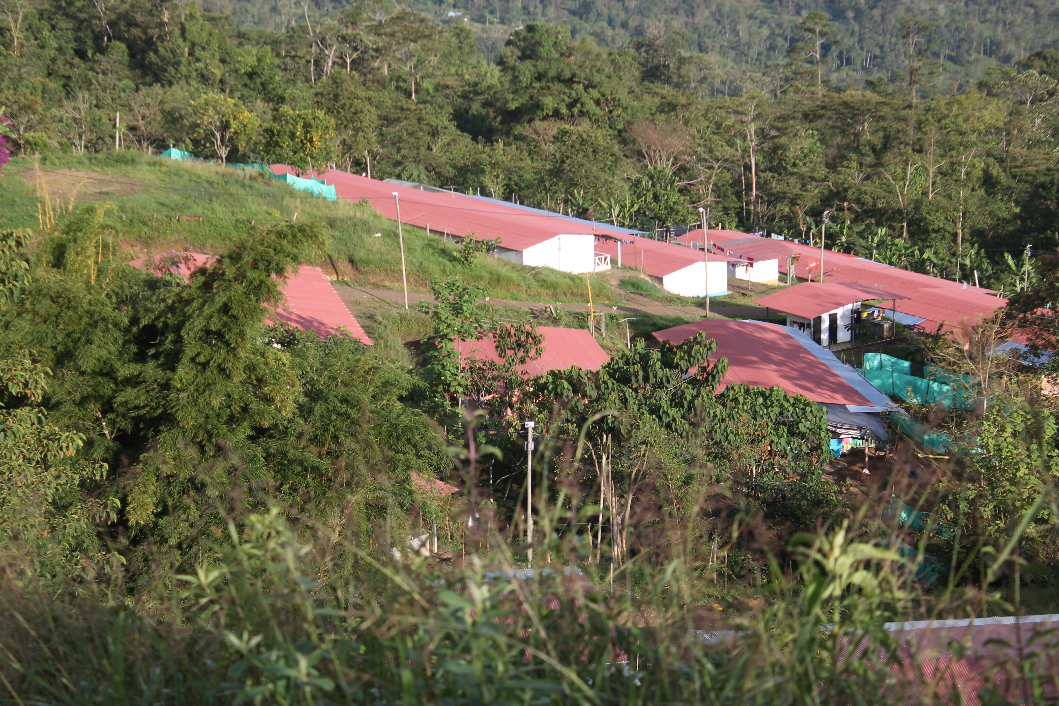 Imagen panorámica del ETCR de Icononzo, en la vereda La Fila.